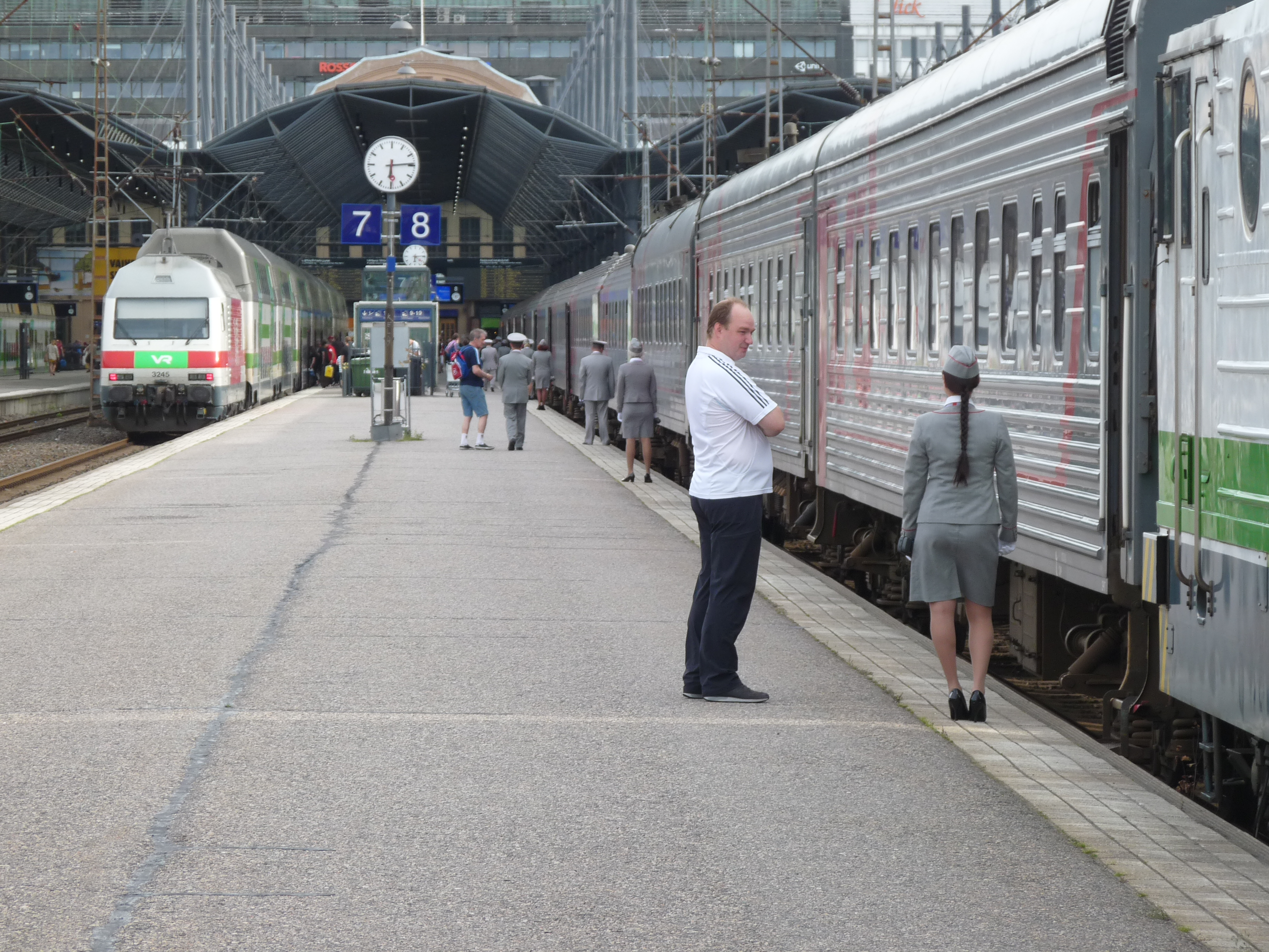 Nachttrein naar Moscow in het Centraal station van Helsinki